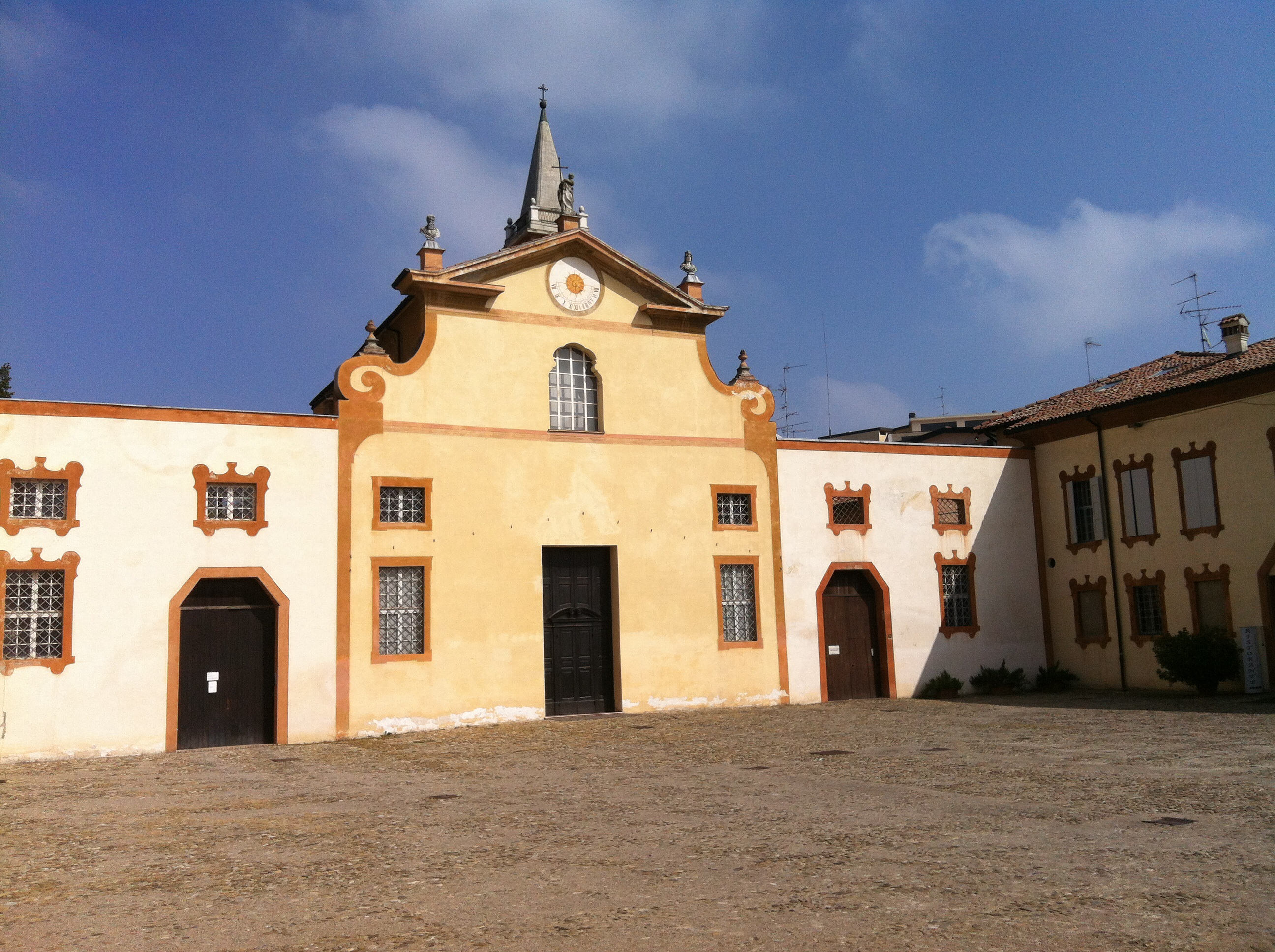 Palazzo Ducale - MIBAC This is a photo of a monument which is part of cultural heritage of Italy.